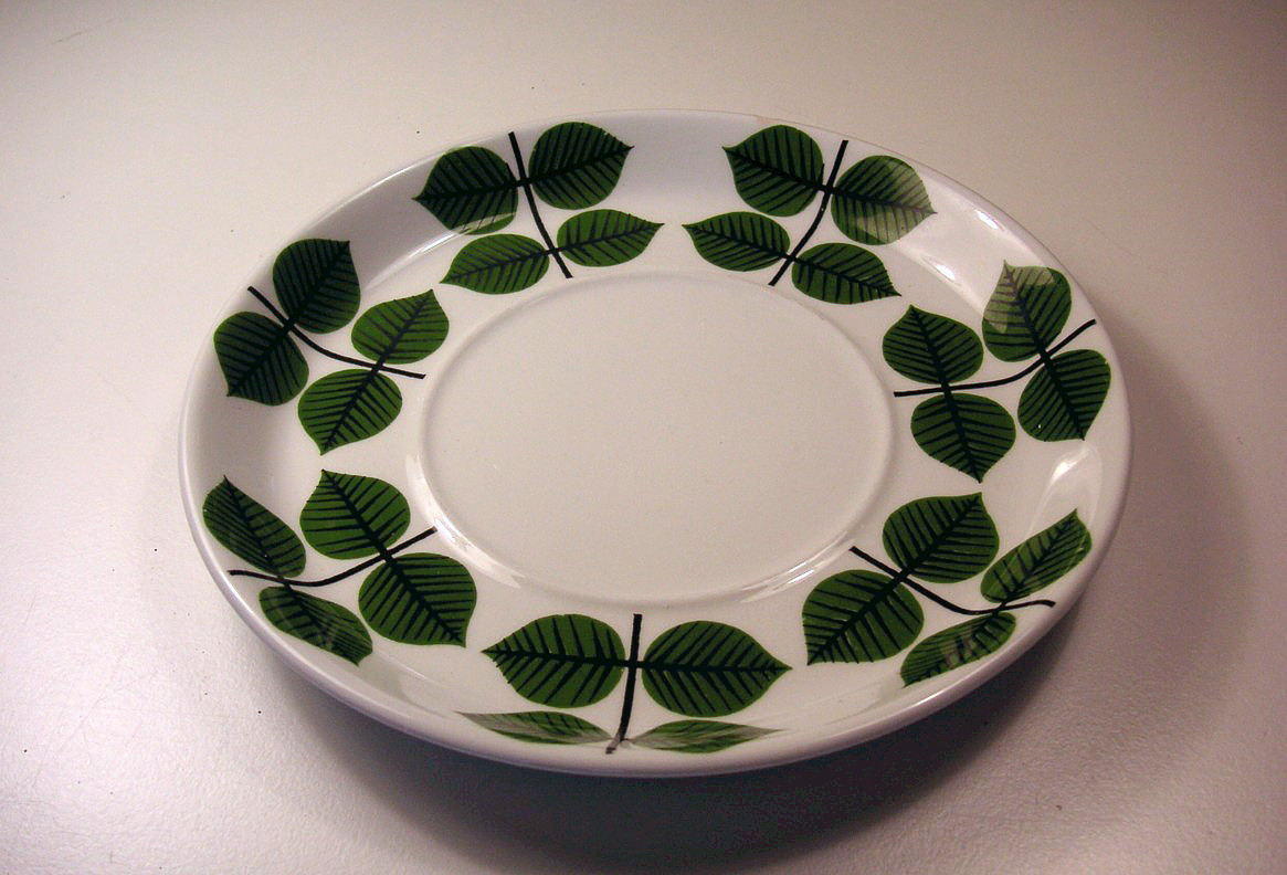 Thefat till Stig Lindbergs thekopp "Berså"